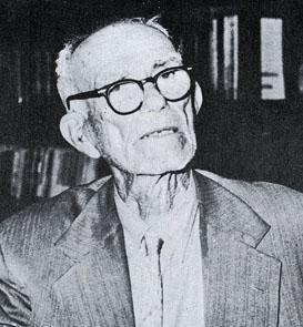 El Zapatista General Amador Acevedo.